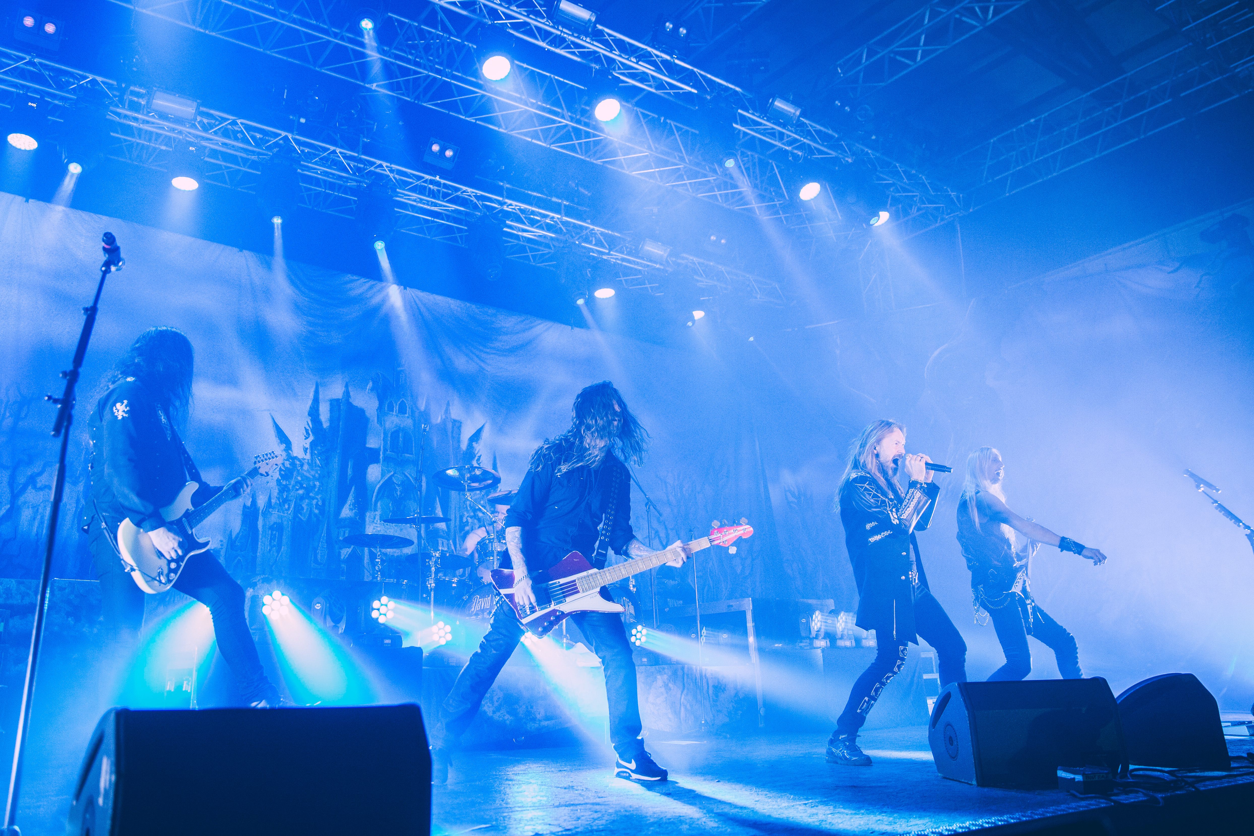 Hammerfall at Ruhrpott Metal Meeting (2015), Turbinenhalle, Oberhausen (DEU) /// leokreissig.de for Wikimedia Commons